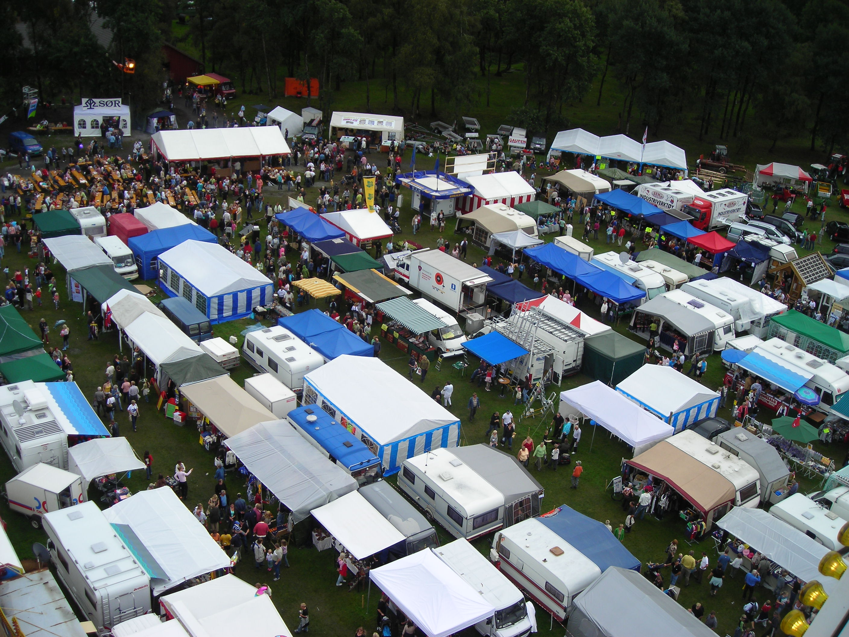 Lyngdal Dyrsku 2006 sett fra pariserhjulet på Lunds Tivoli